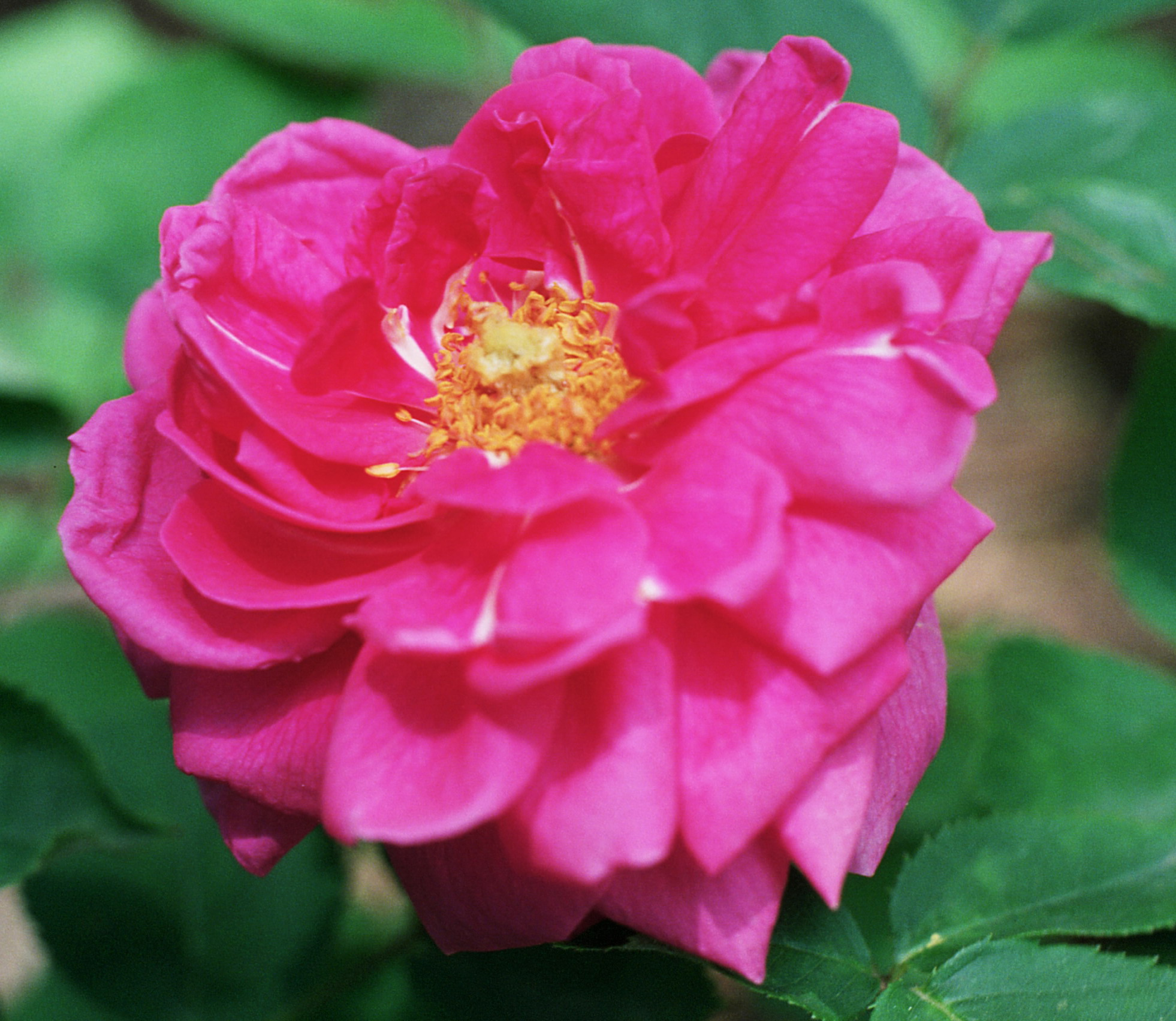 Rosa 'Jules Margottin', Híbridos reflorecientes, sect. Rosa. Real Jardín Botánico, Madrid